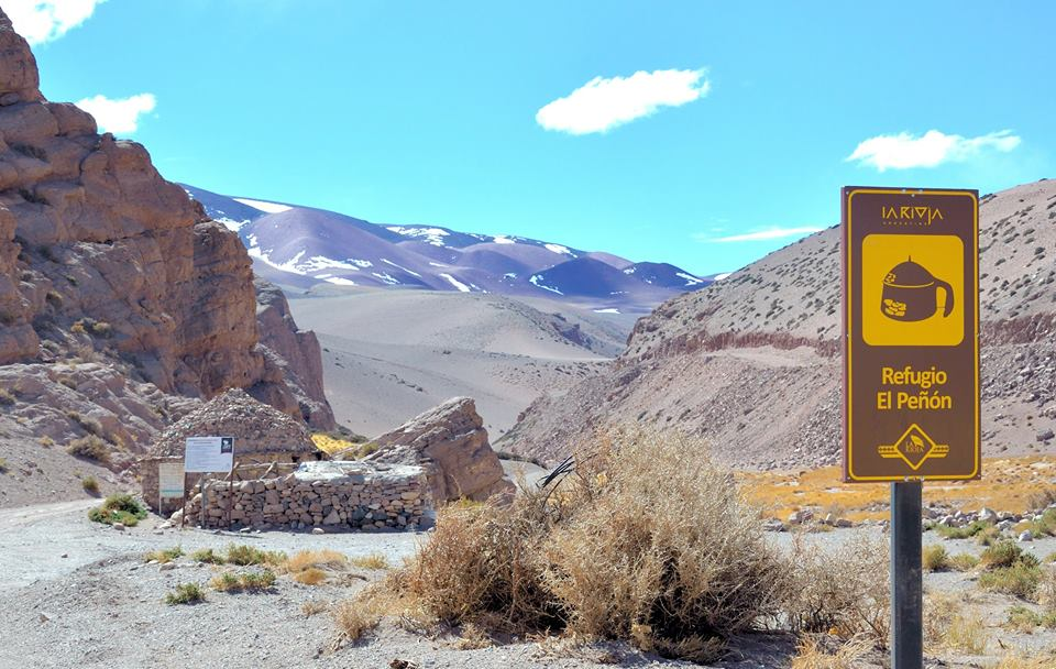 se ubica en el paso Pircas Negras, es un refugio construido en el año 1873. De material piedra, y se encuentra del lado Argentino.